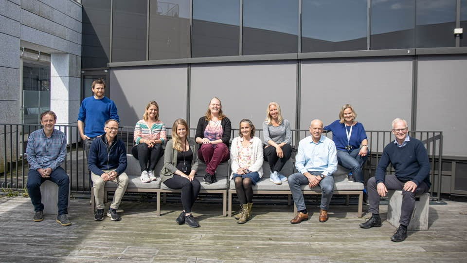 Eyde-klyngens sekretariat inkludert styreleder Helge Aasen